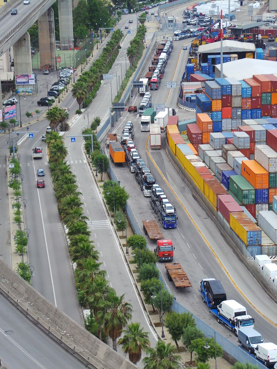 Viale alberato porto di salerno